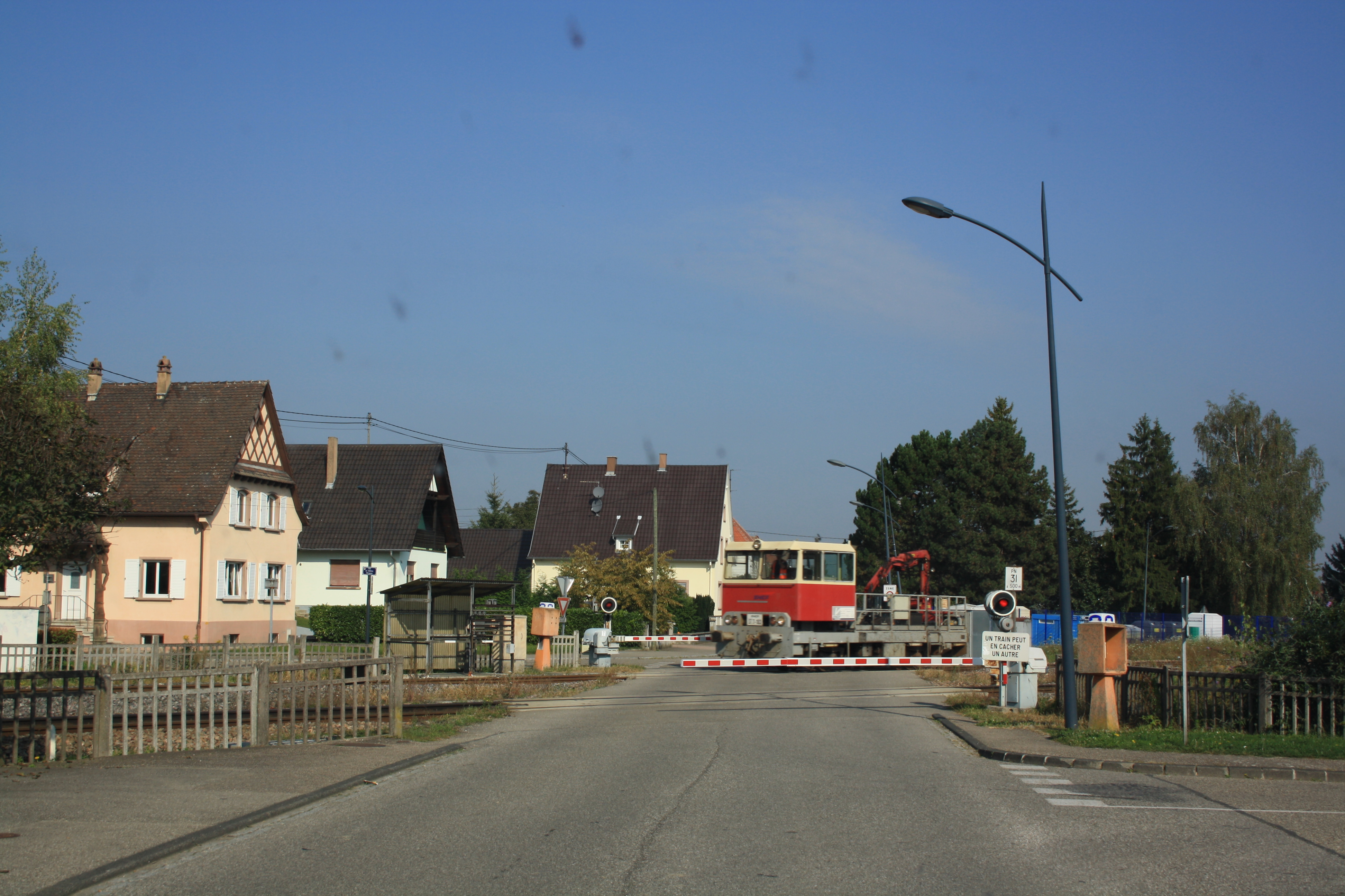 Herlisheim, Elsass